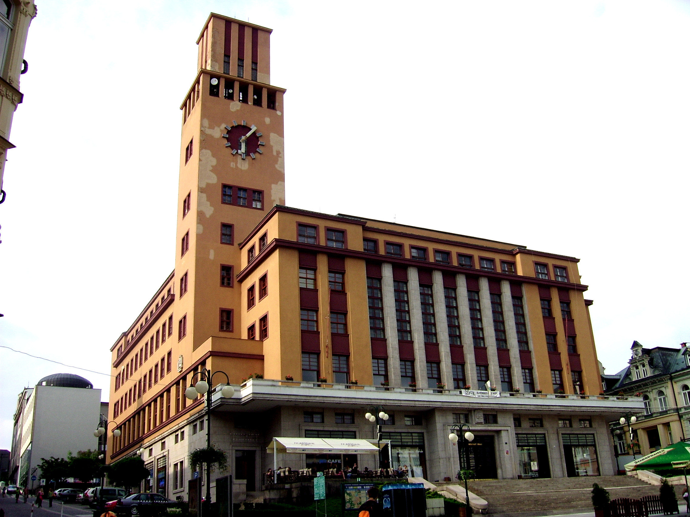 Rathaus in Jablonec nad Nisou